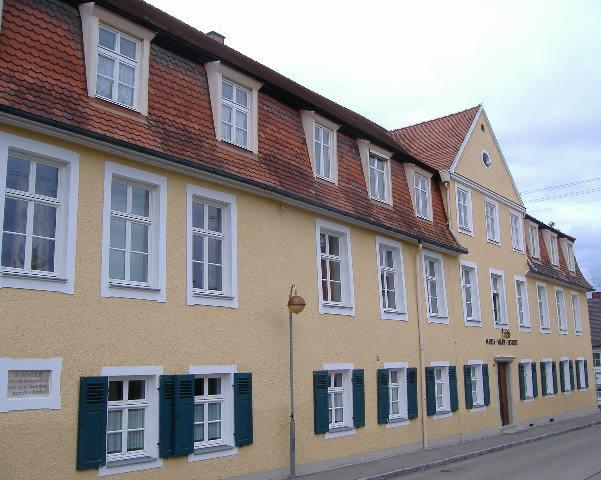 Wallerstein